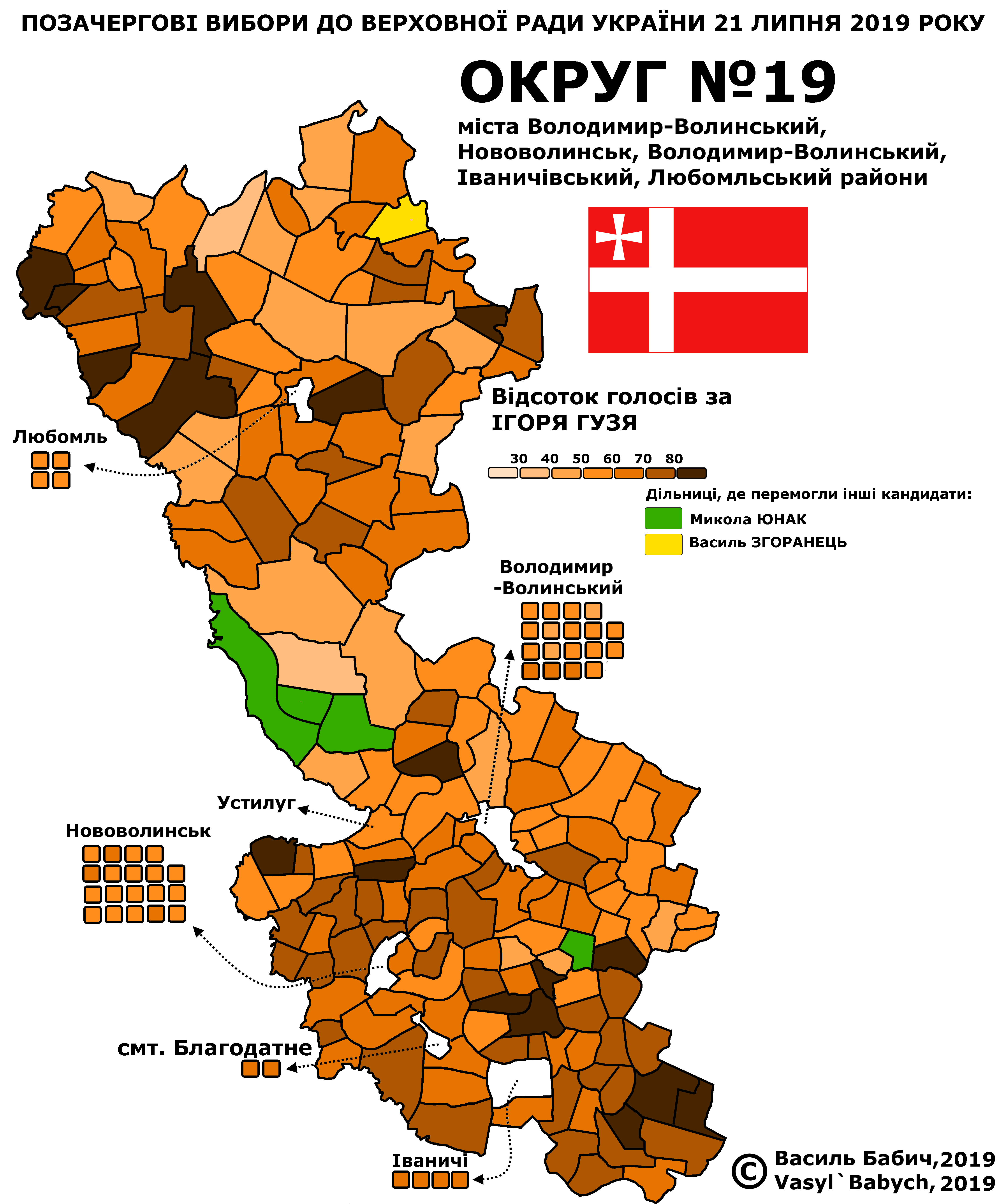 Відсоток підтримки Ігоря Гузя по округу №19, Волинська область на виборах до Верховної Ради України 21 липня 2019 року